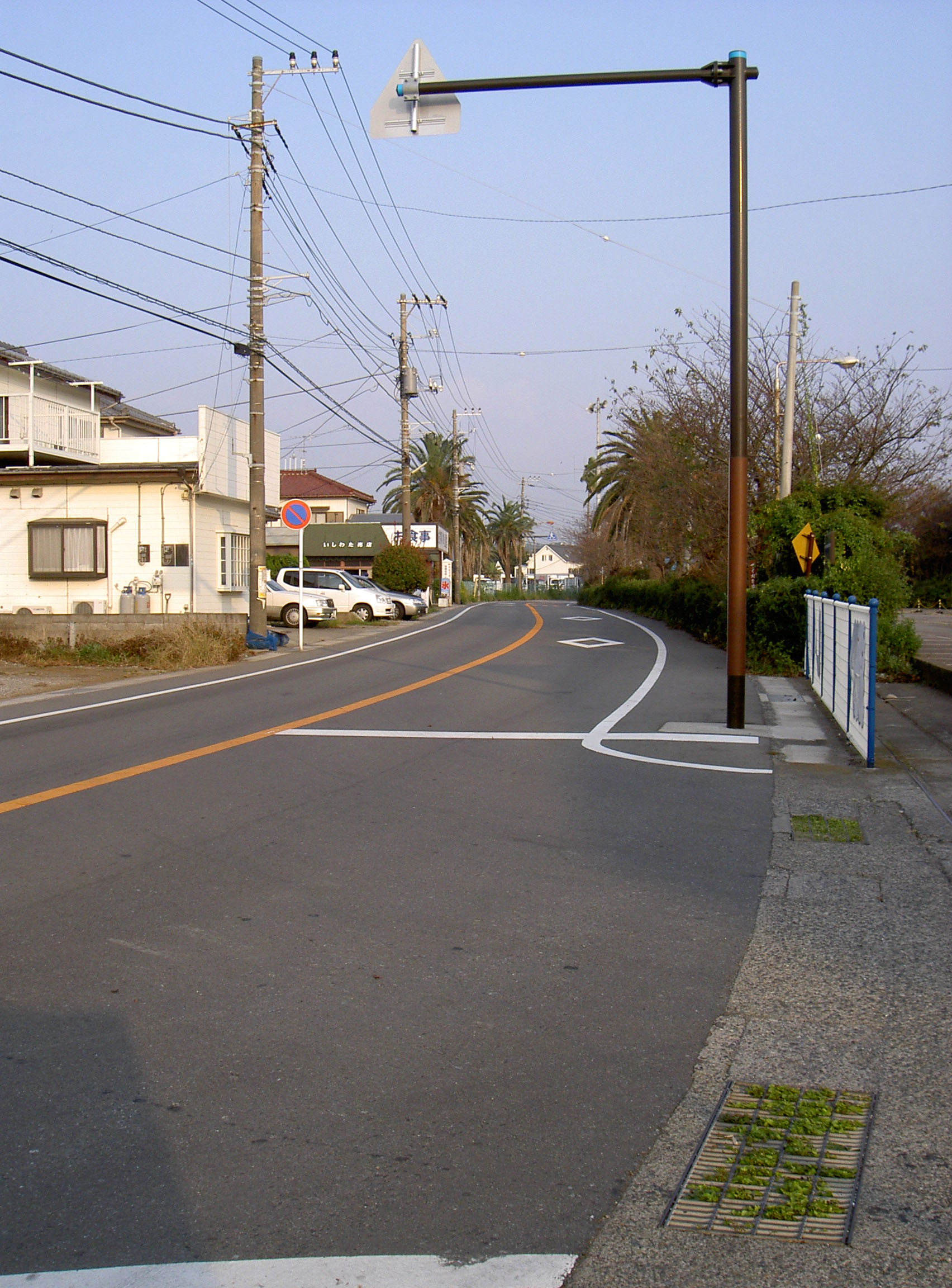 Kanagawa Prefectural Road Route 216 ja: 神奈川県道216号油壷線